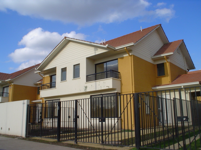 Fotografía de Ciudad Satélite 2, en Maipú - Santiago de Chile, tomada por kurotashiO! para Wikipedia.